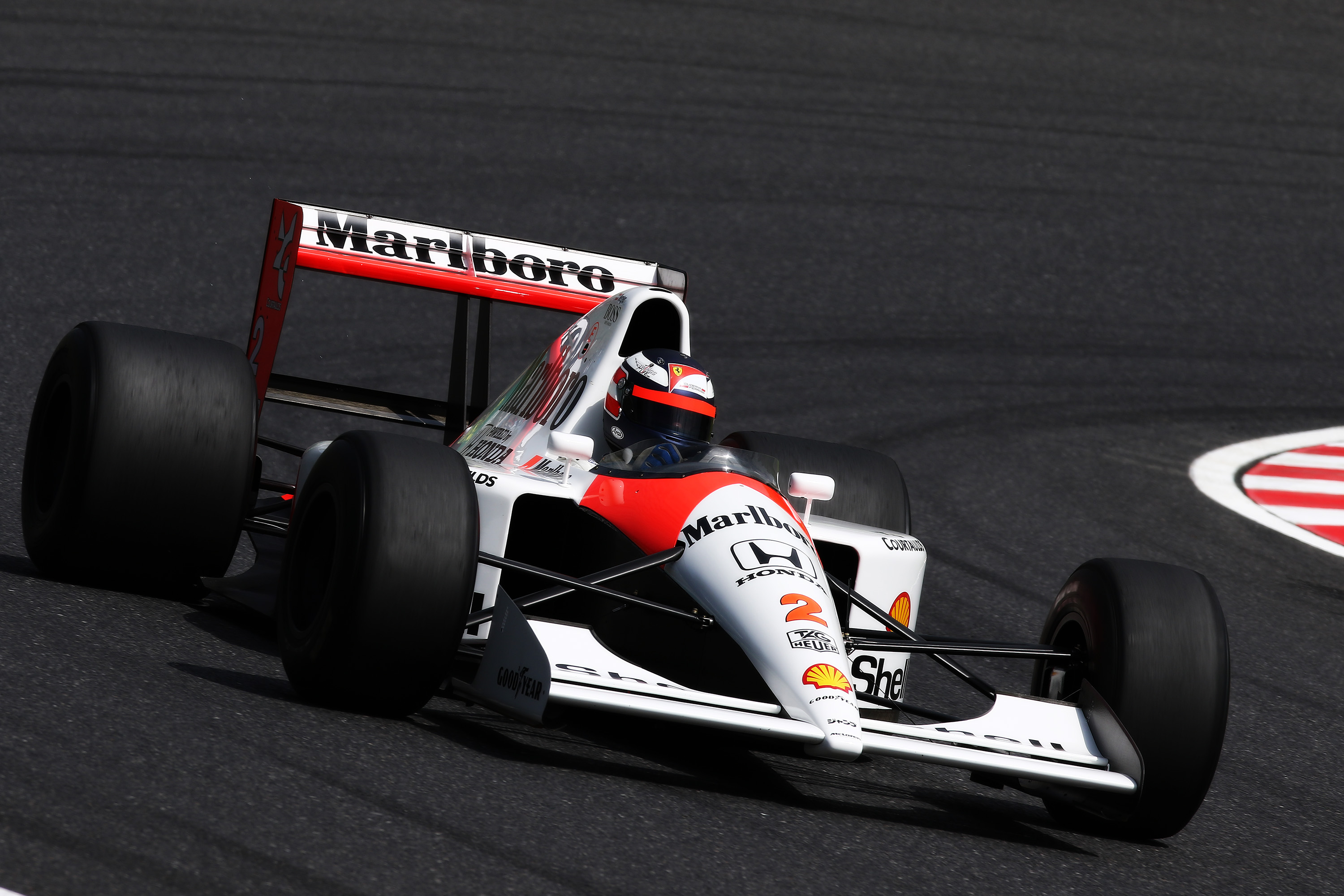 2015.9.27 F1 Rd.14 Suzuka Demonstration Run Driver: Gerhard Berger レジェンドF1デモラン マクラーレン・ホンダ MP4/6 ゲルハルト・ベルガー [7D2_7132ks]